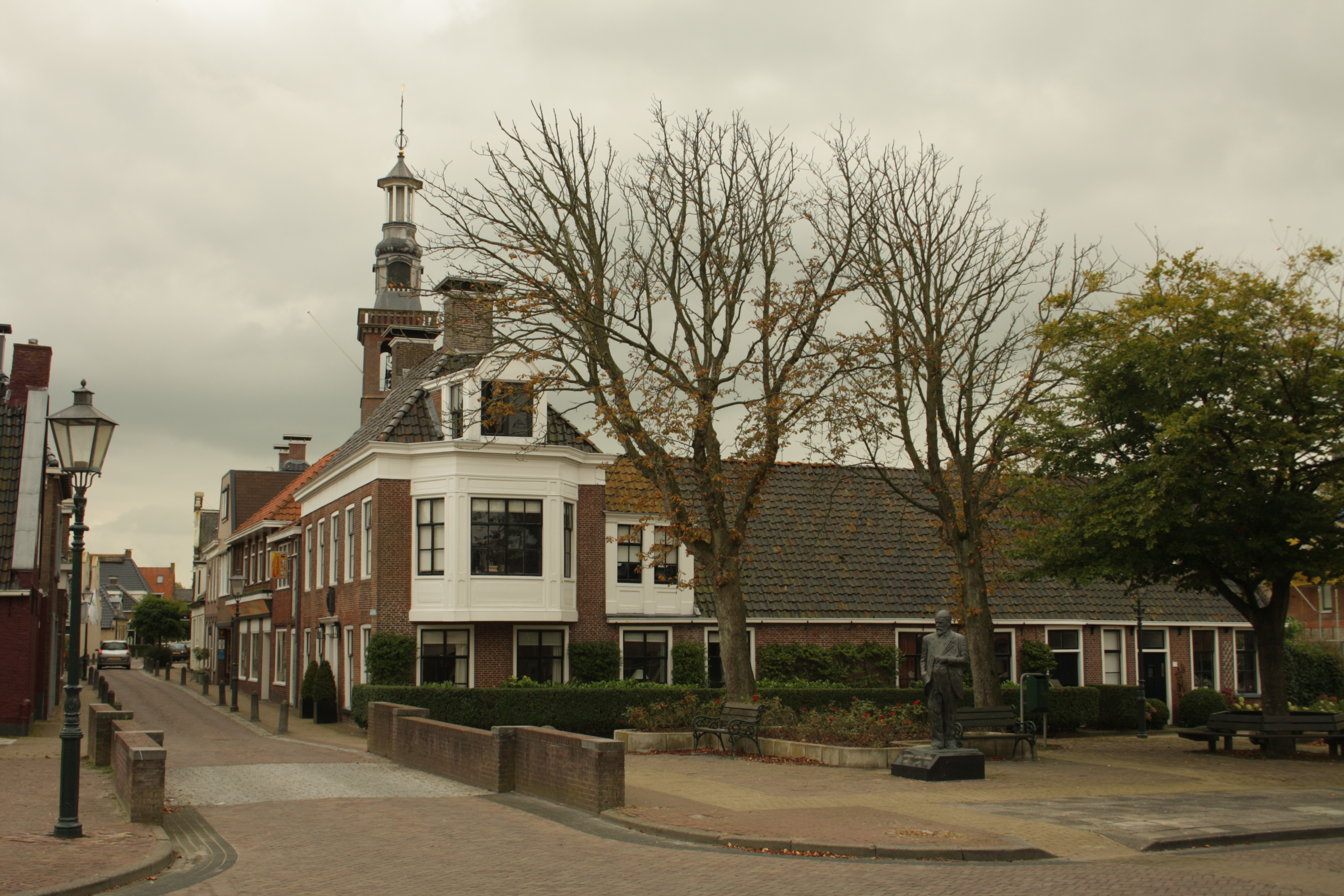 Dûbelestreek 2, Alma Tademahuis te Dronrijp. Het huis met daarvoor het standbeeld van Lawrence Alma-Tadema.